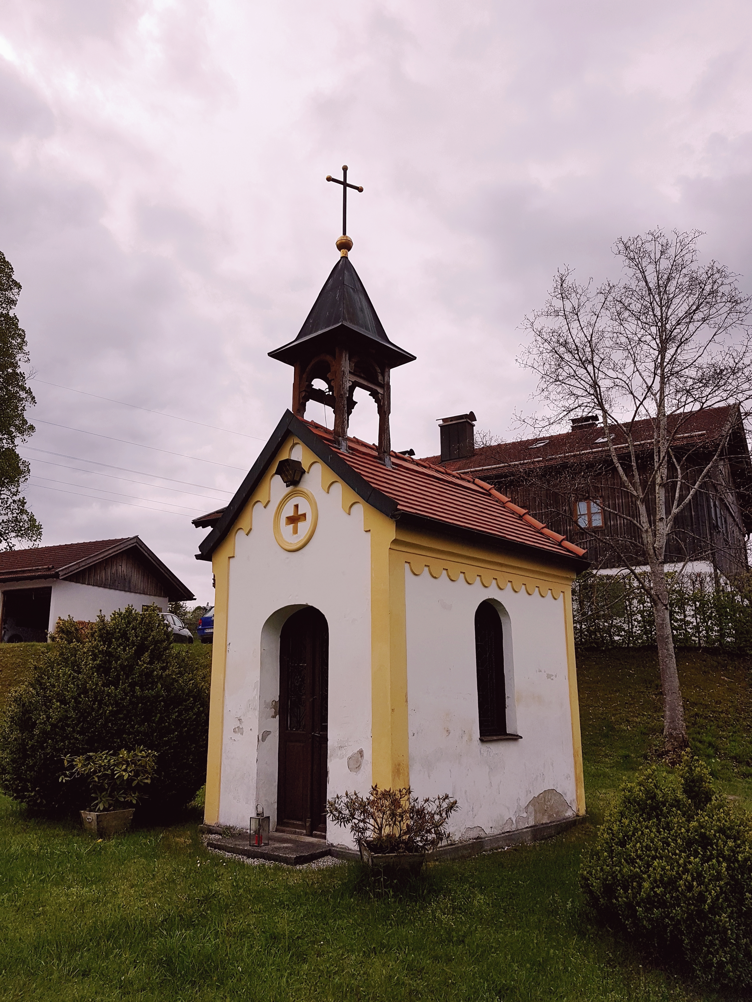 Schönrain (Königsdorf), Kapelle